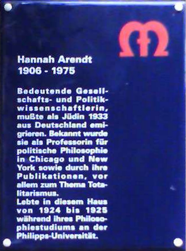 Gedenktafel an Hannah Arendt in Marburg, Lutherstraße 4